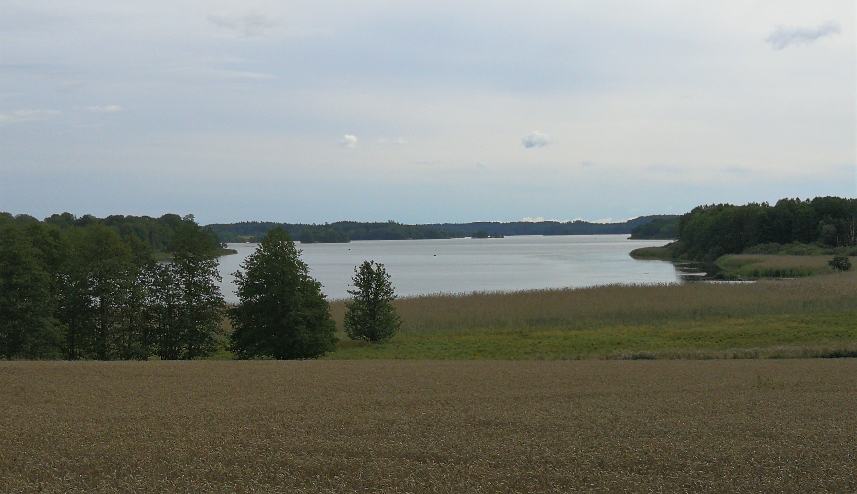 Storsjön, Kattnäs socken, Gnesta, Södermanland, september 2017